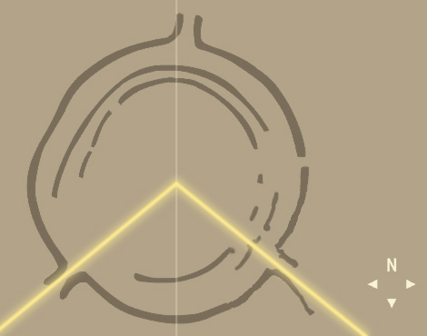 Original text in the german Wikipedia: Sonnenobservatorium von Goseck. Aufsicht mit Darstellung von Sonnenauf- und untergang zur Wintersonnende. Eigene Zeichnung auf Basis von Plänen des Instituts für Prähistorische Archäologie Martin-Luther-Universität Halle-Wittenberg